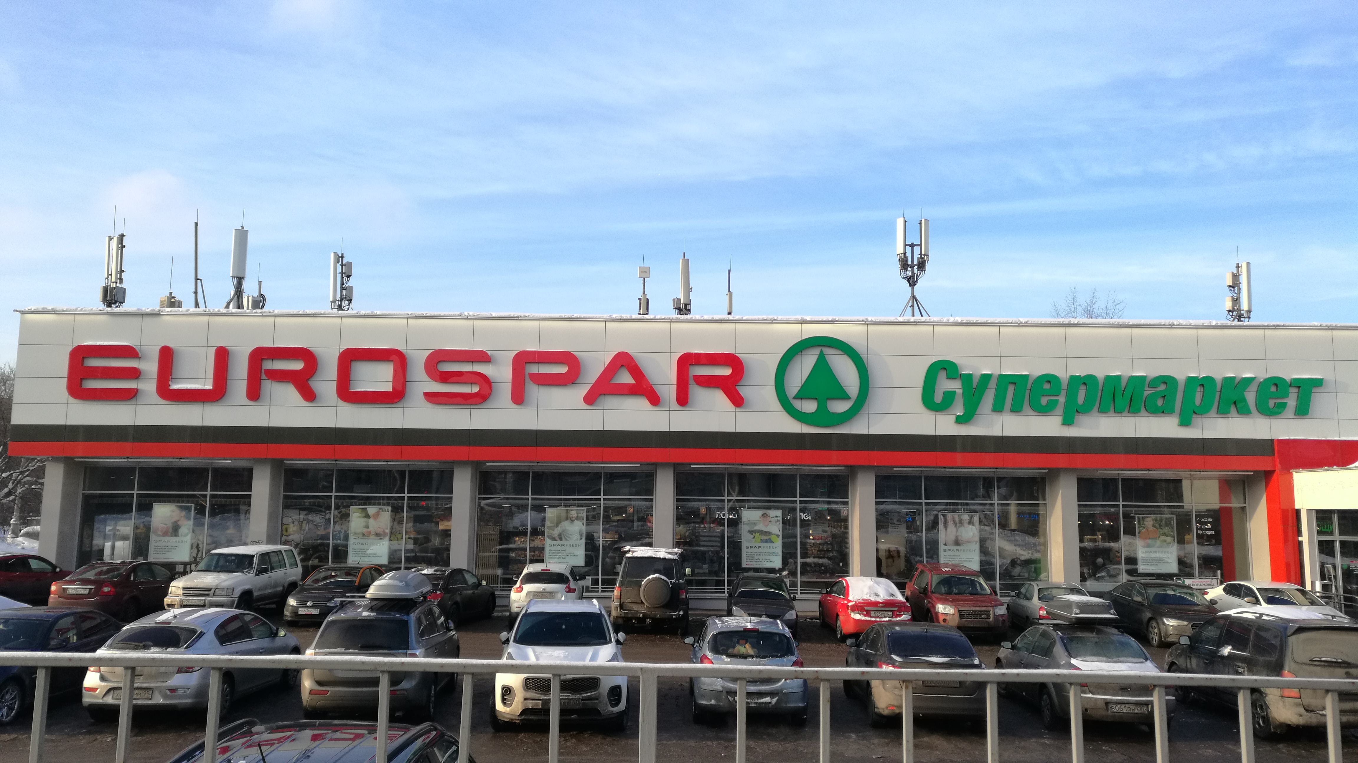 Superbazaro "Eurospar". Moskvo, Rusio.